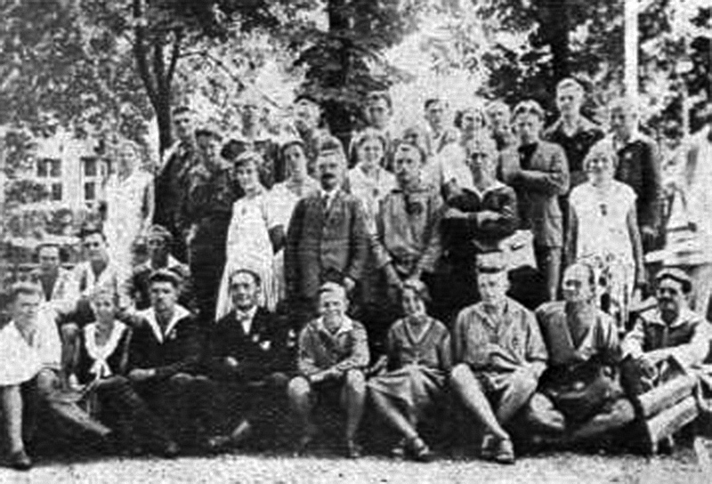 9a SAT-kongreso en Leipzig, 4-10 de aŭgusto 1929. Patroprenantoj de la vegetarana fakkunsido dum la kongreso